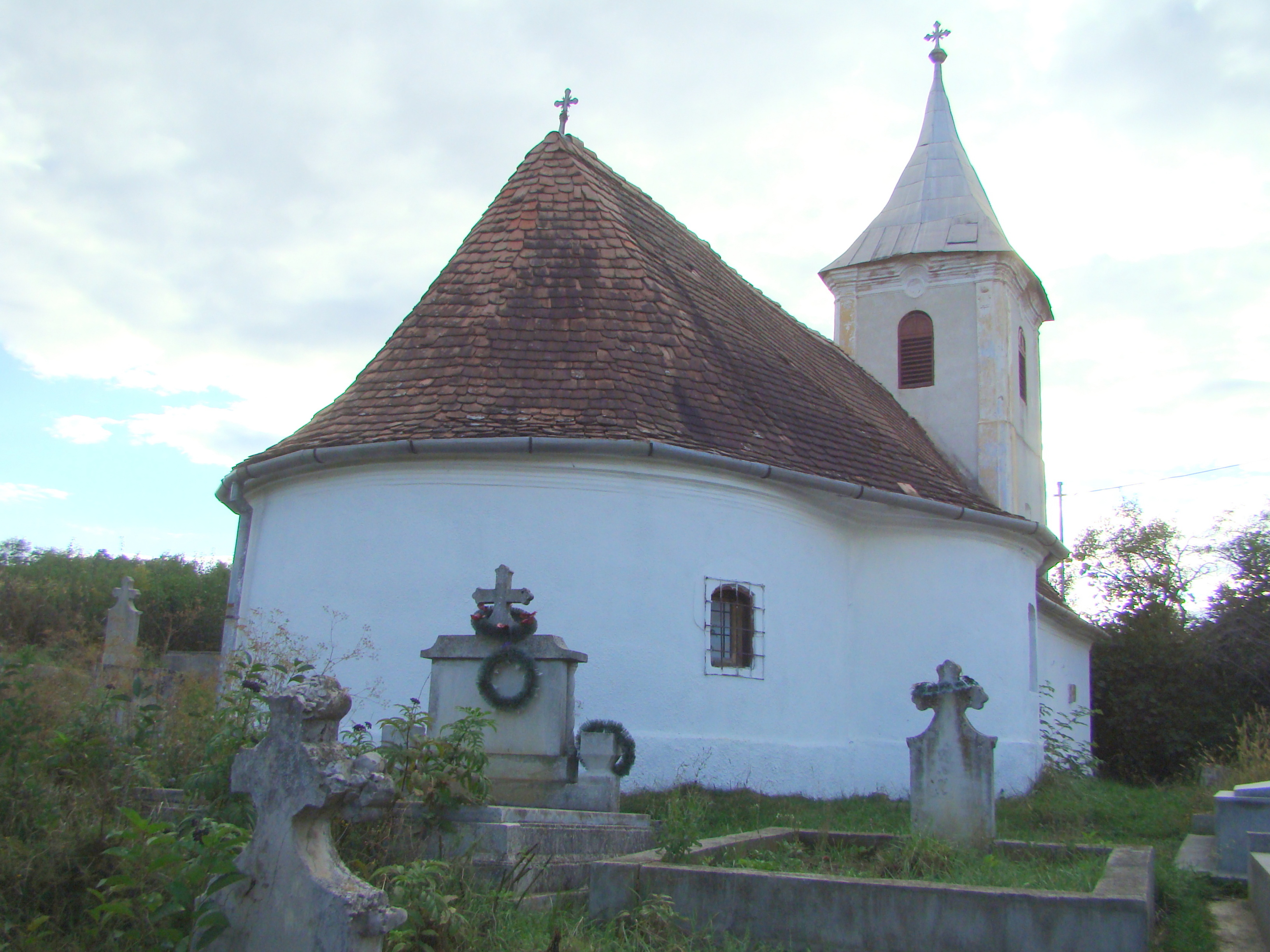 Biserica „Sfinţii Arhangheli”, sat Lepindea; comuna Bahnea